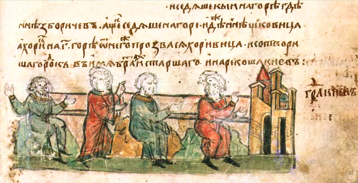 Кий, Хорив, Щек. Радзивіллівський літопис